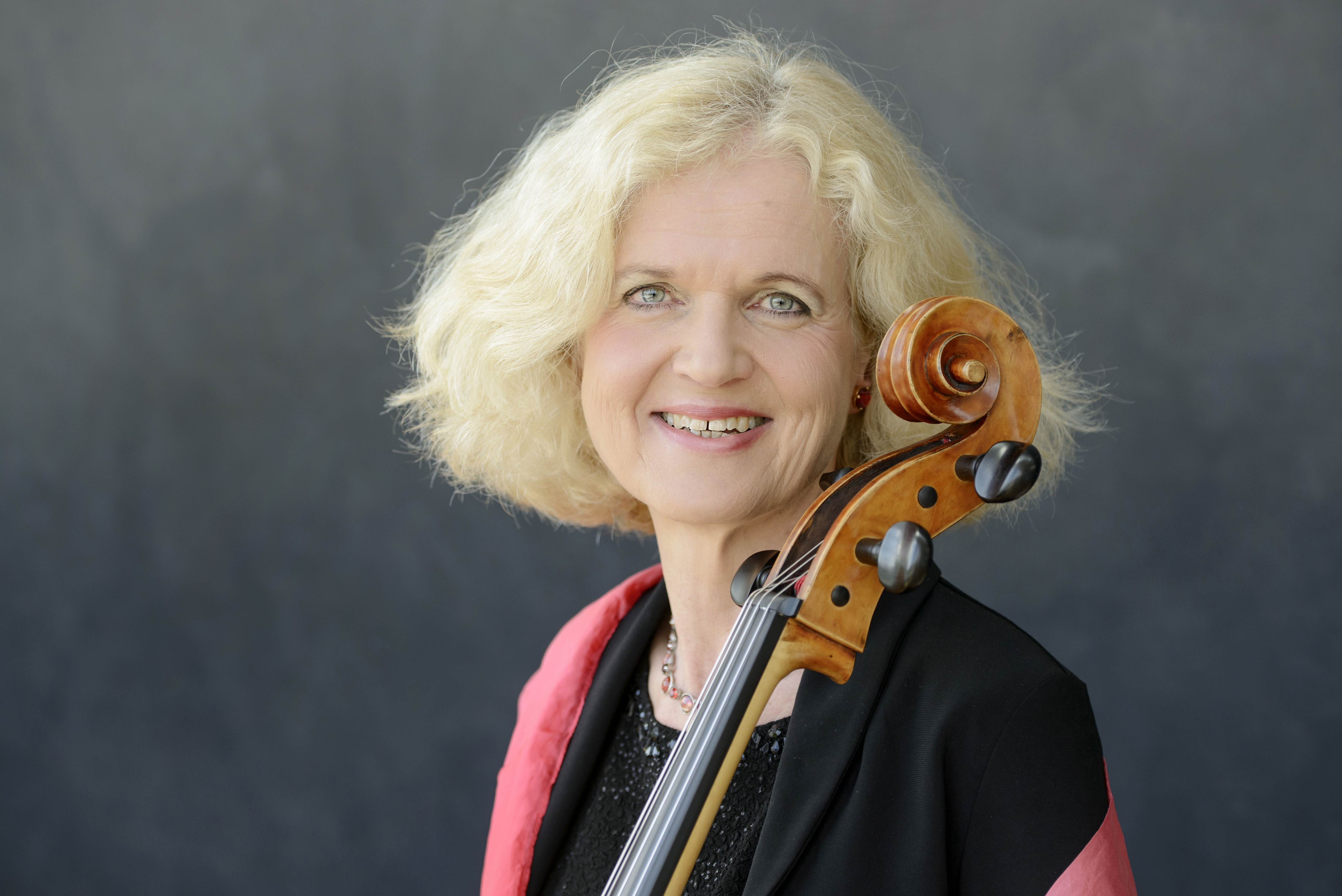 Claudia Schwarze-Nolte 2018